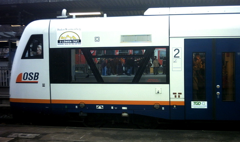 RS1 der OSB Autor: Michael Meding Kategorie:Triebfahrzeug (Deutschland)